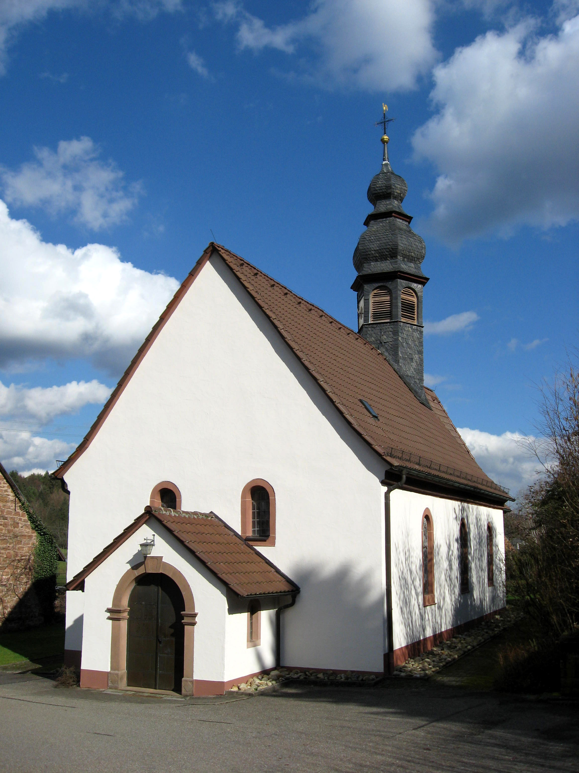 Wallfahrtskirche Mariä Geburt in Böllenborn